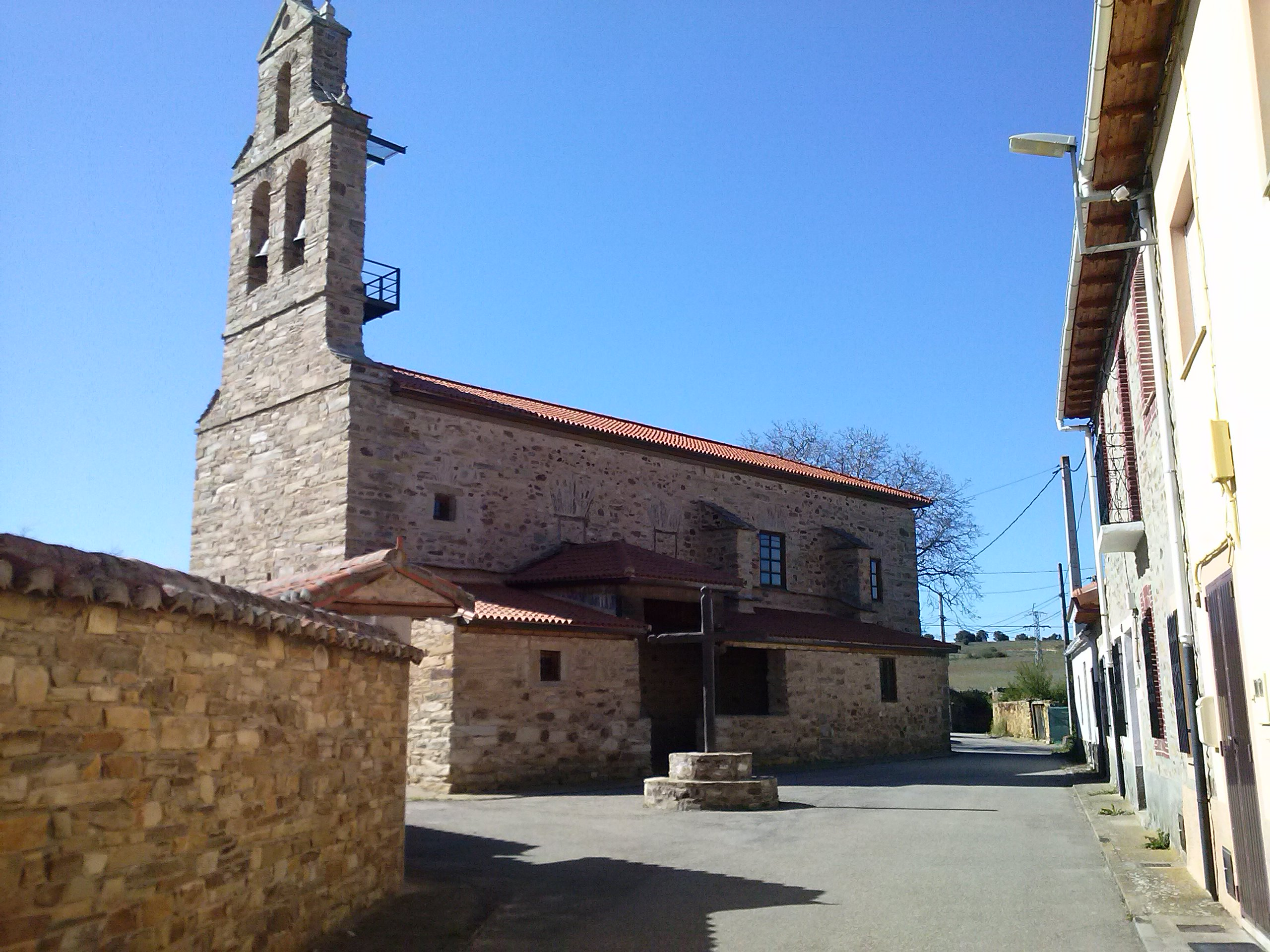 Morales del Arcediano, en Santiago Millas (León, España).